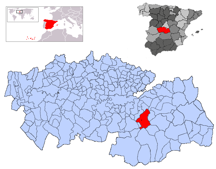 Mora en la provincia de Toledo